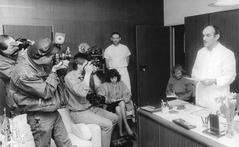 Berlin, Charité, Horst Vogler, Pressekonferenz ADN-ZB Reiche 29.1.90 Berlin: Ärztliche Stellungnahme- Der behandelnde Arzt Erich Honeckers, Prof. Dr. Peter Althaus (r), Direktor der Klinik und Poliklinik für Urologie am Bereich Medizin der Charité der Humboldt-Universität zu Berlin, informierte in einer "Ärztlichen Stellungnahme" darüber, daß der frühere Staats- und SED-Chef Erich Honecker haftuntauglich ist. Mitte: Dr. Horst Vogler. (siehe auch 14+15N)